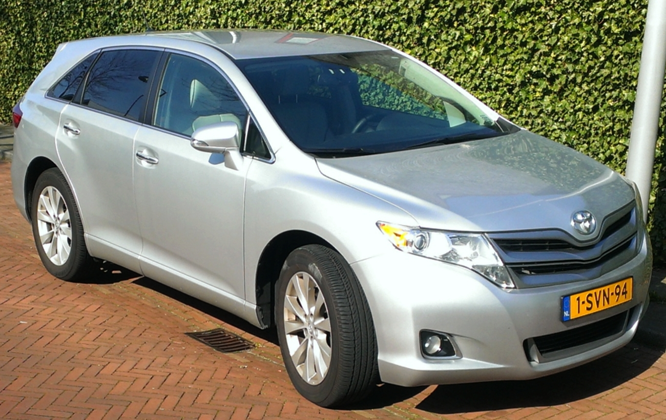 Toyota Venza imported to the Netherlands